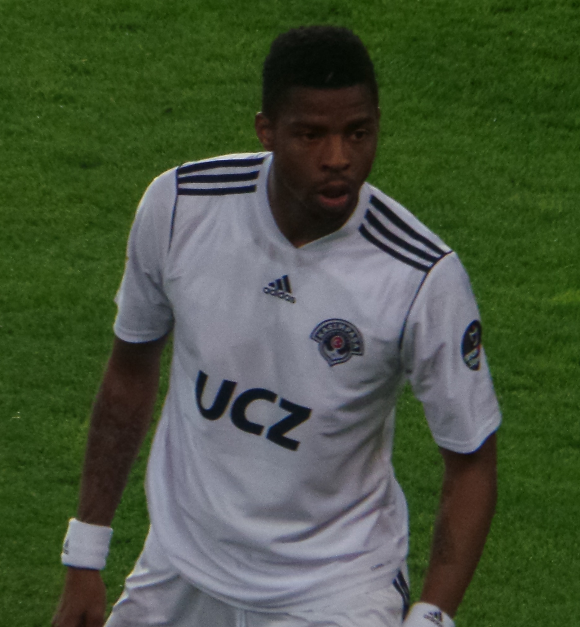 Donk @ FB Match